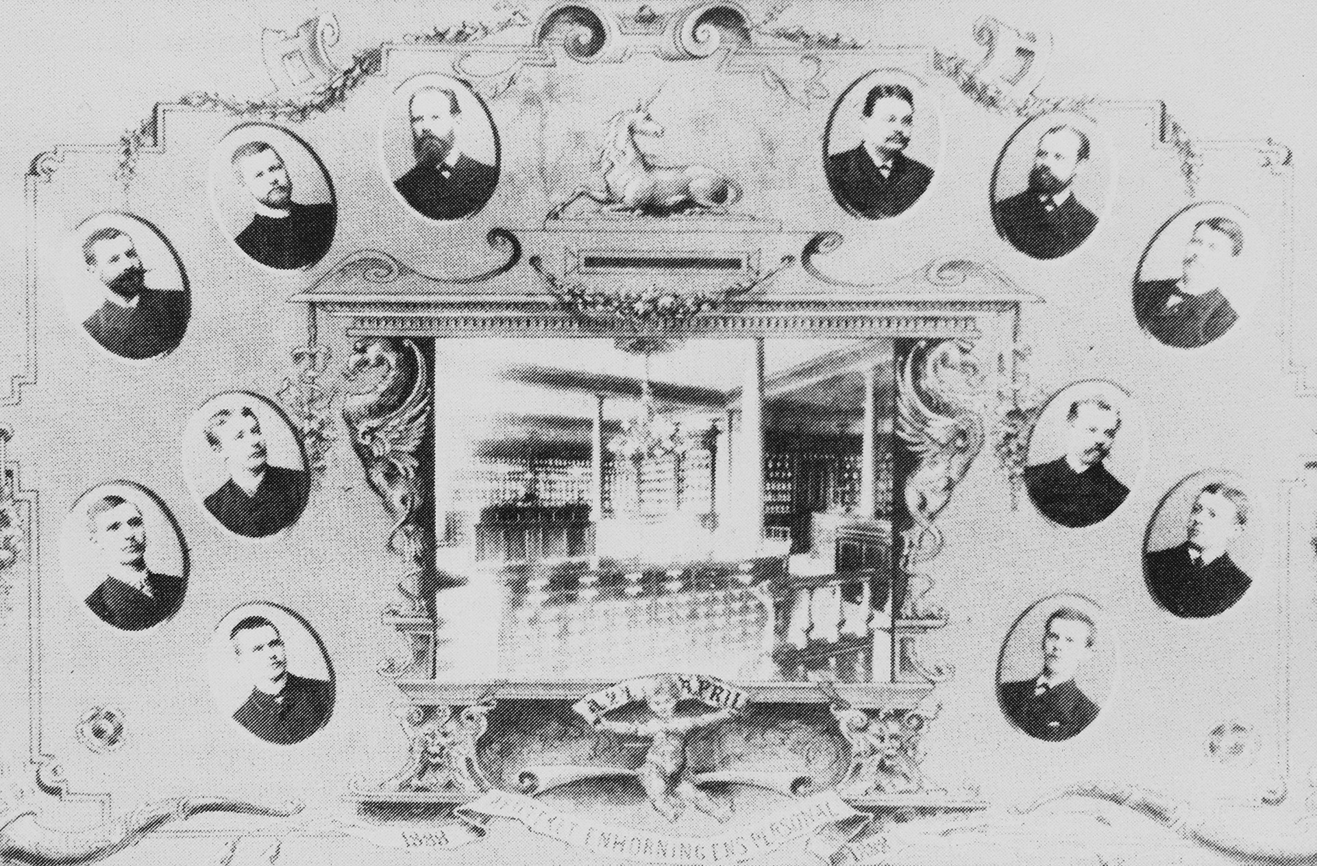 Tavla på Apoteket Enhörningen 1888. Personal och officininredning